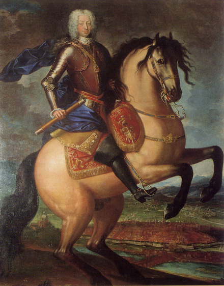 Equestrian portrait of Charles Emmanuel III of Sardinia (1701-1773)label QS:Len,"Equestrian portrait of Charles Emmanuel III of Sardinia (1701-1773)" label QS:Lhu,"III. Károly Emánuel szárd–piemonti király, született Torinóban, 1701. április 27., meghalt Torinó, 1773. február 20.. 1730-1773 között Szárd-piemonti király, Savoya hercege, Piemont hercege. Szülei: II. Viktor Amadé szárd–piemonti király (1666-1732) és Anna Mária orléans-i hercegnő (1669-1728)." label QS:Lit,"Ritratto di Carlo Emanuele III di Savoia, re di Sardegna, con sullo sfondo la città di Torino (Regione Piemonte, in deposito presso la Reggia di Venaria Reale"